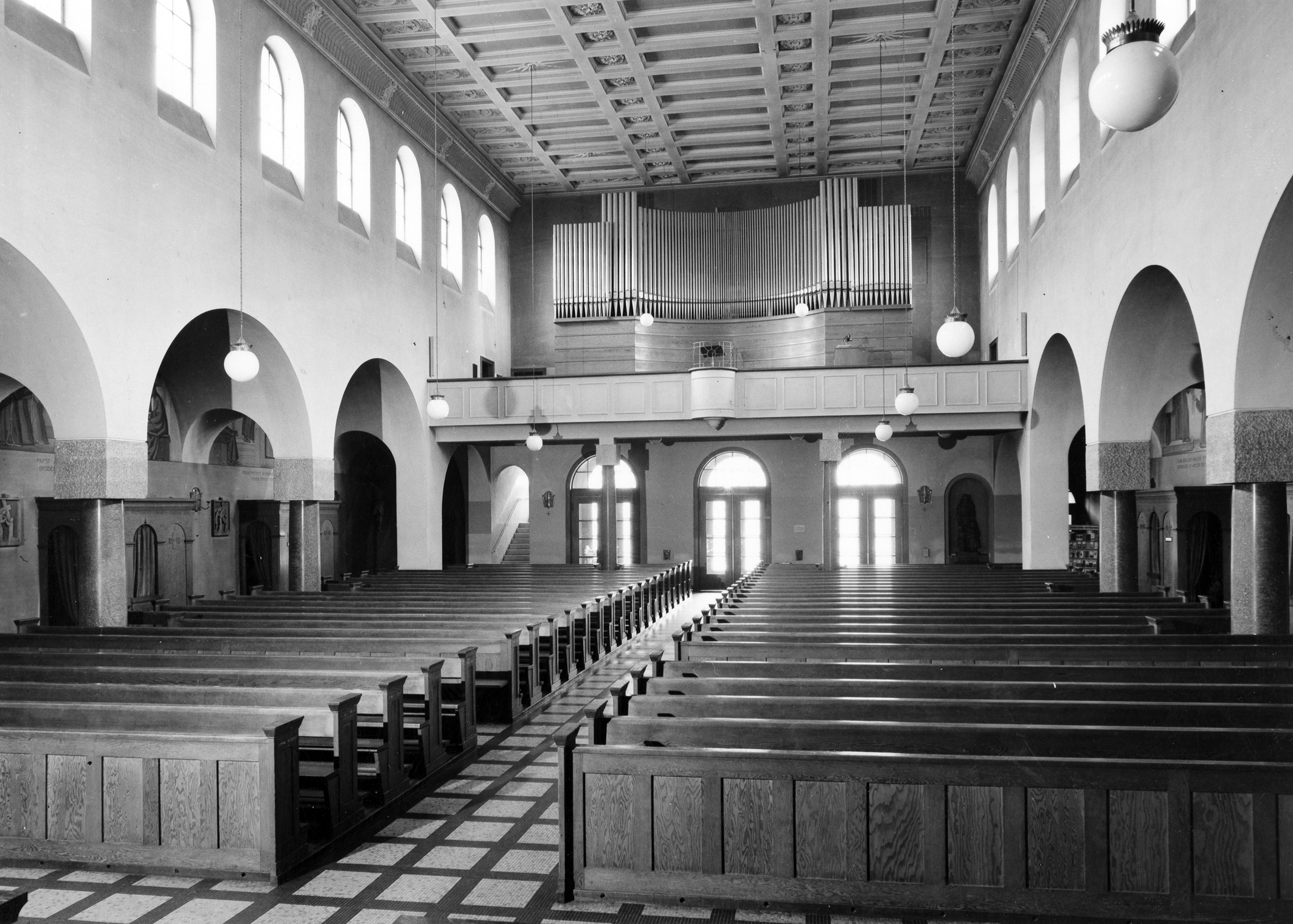 Römisch-katholische Pfarrkirche St. Franziskus Zürich-Wollishofen, Innenansicht vor 1972